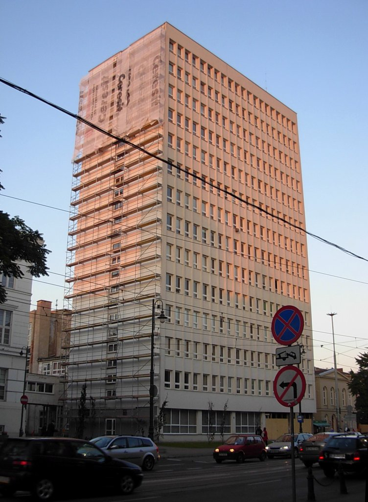 Budynek Kujawsko-Pomorskiego Urzędu Wojewódzkiego, Bydgoszcz Jagiellońska 3